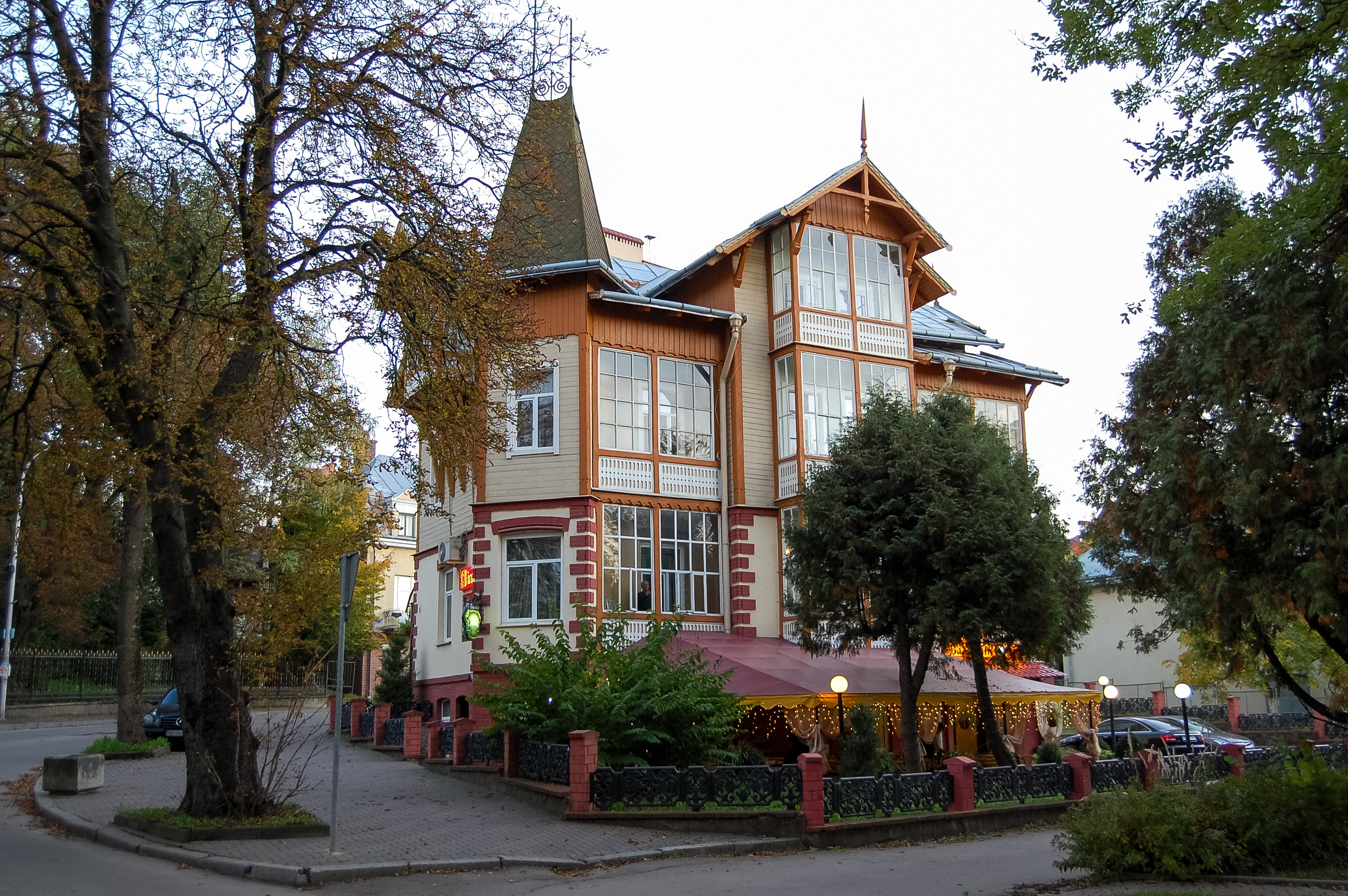 Вілла «Погонь» (зміш.), Трускавець, вул. Шевченка, 38